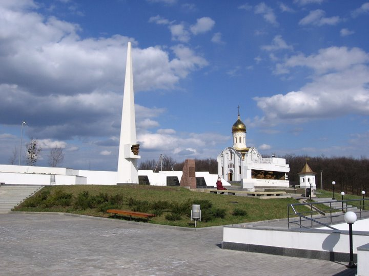 Высота Маршала Конева (мемориальный комплекс). Харьковская область, п. Солоницевка.